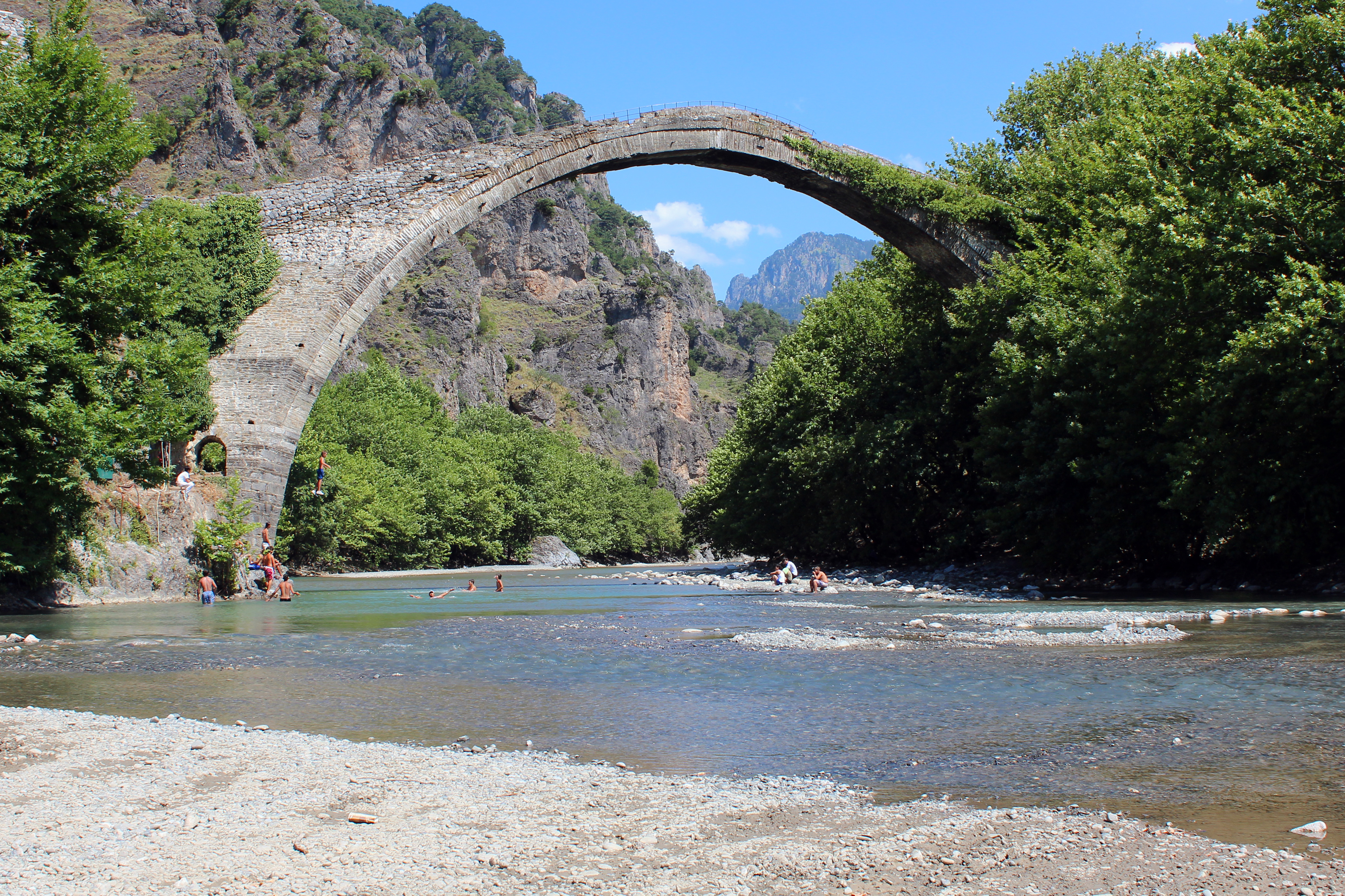 Το Γεφύρι της Κόνιτσας (Ποταμός Αώος)